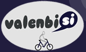 Logotipo de la empresa Valenbisi.